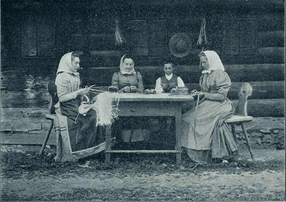 Domači obrti na Kranjskem - izdelovanje slamnikov.